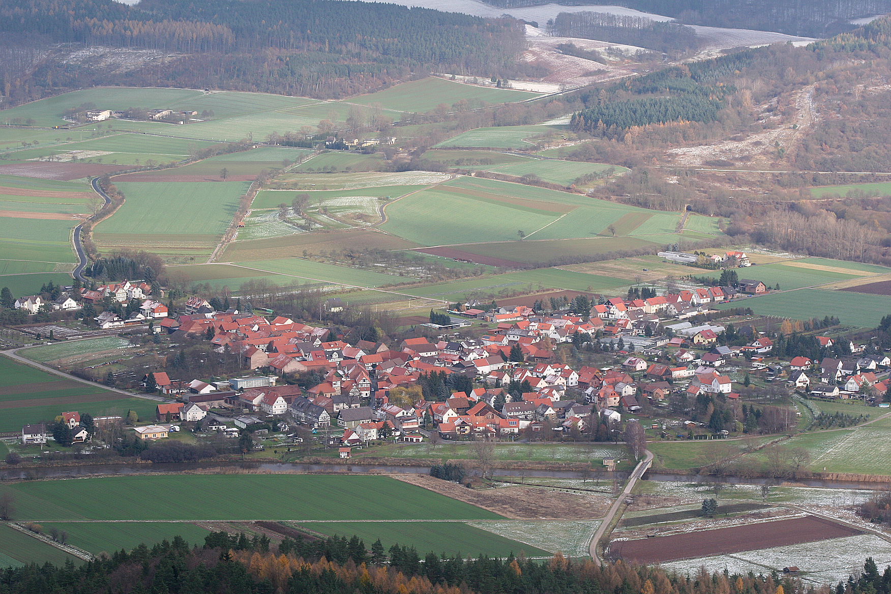 23_11_2008_blick_auf_heldra_vom_heldrastein.jpg